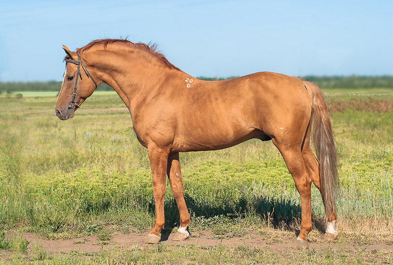 Донской жеребец производитель Бруч (Бизон - Челеста) К/з им. Будённого